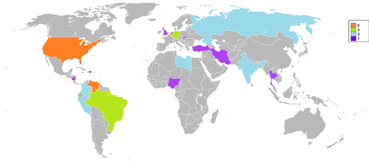 Paises y territotios que han ganado el titulo de miss intercontinental